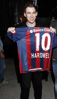 Hardwell con la camiseta de San Lorenzo